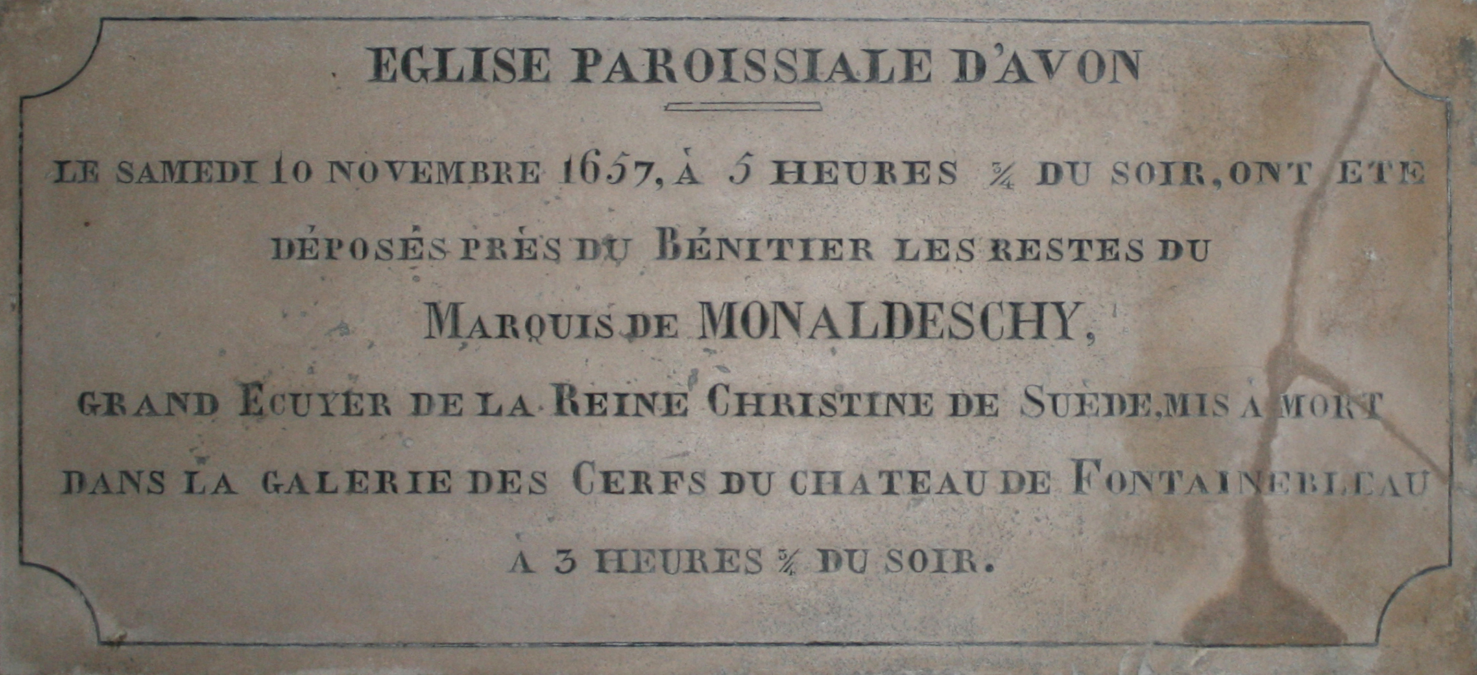 Plaque tombale du Marquis de Monaldeschy dans l'église Saint-Pierre à A von